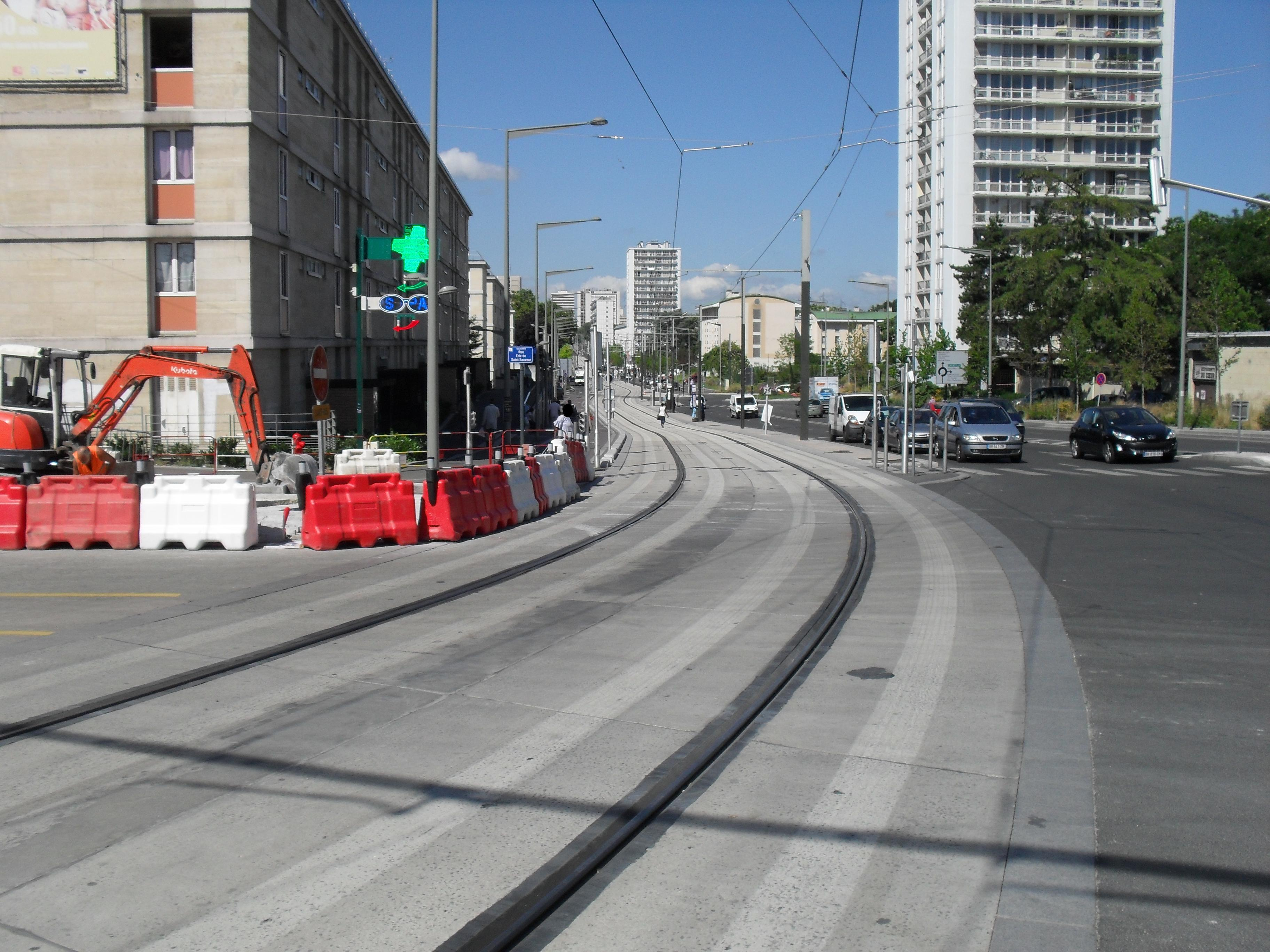 Les infrastructures de la ligne T5 à proximité de la station terminus "Garges-Sarcelles".